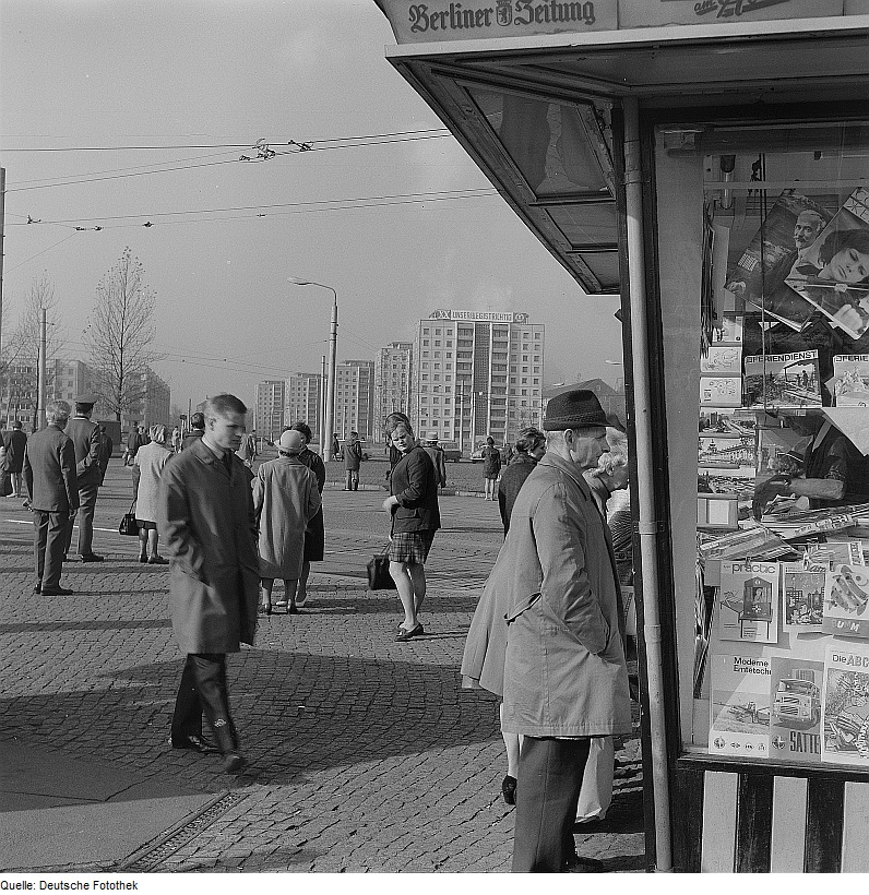 Original image description from the Deutsche Fotothek Dresden. Blick über den Postplatz nach Westen auf die Wohnbebauung Freiberger Straße